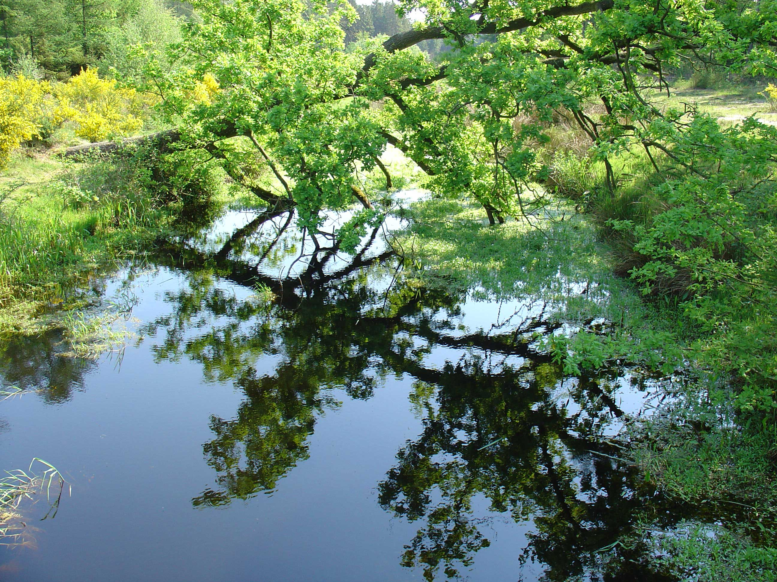 Tilgrup - Dieverveld